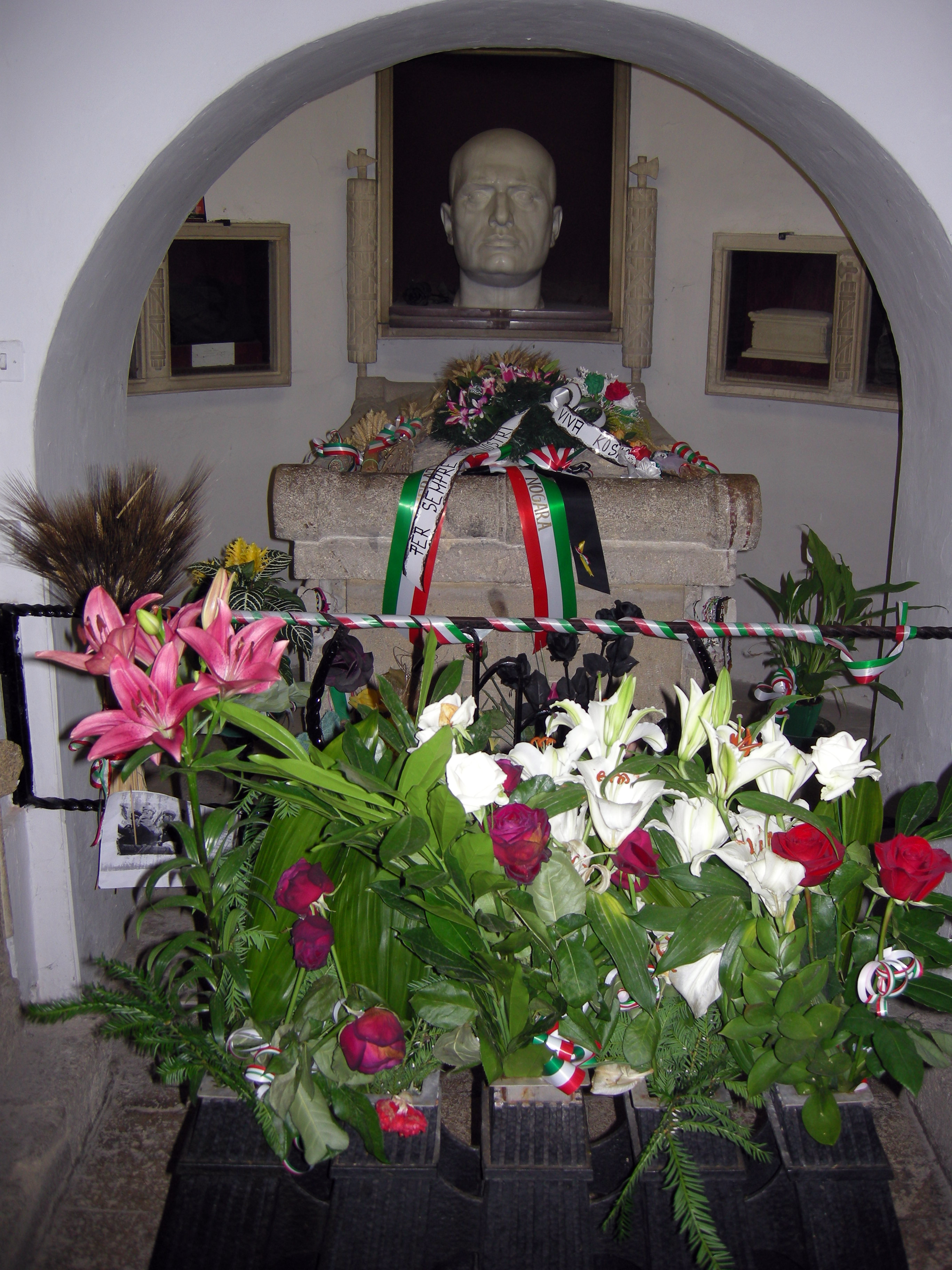 Cripta del cimitero di San Cassiano a Predappio, tombe della famiglia Mussolini